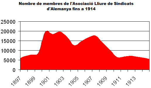 Nombre de membres de l'Asociació Lliure de Sindicats d'Alemanya fins a 1914.